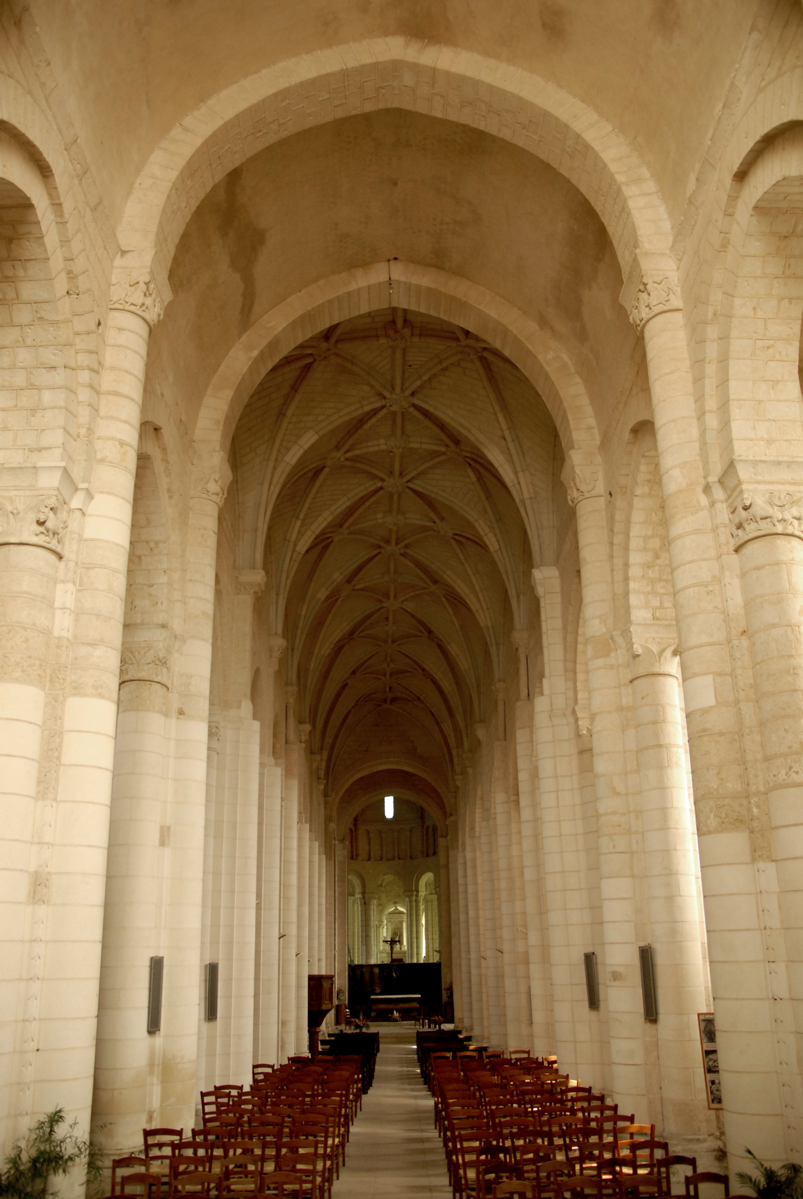 Saint-Jouin-de-Marnes, Mittelschiff